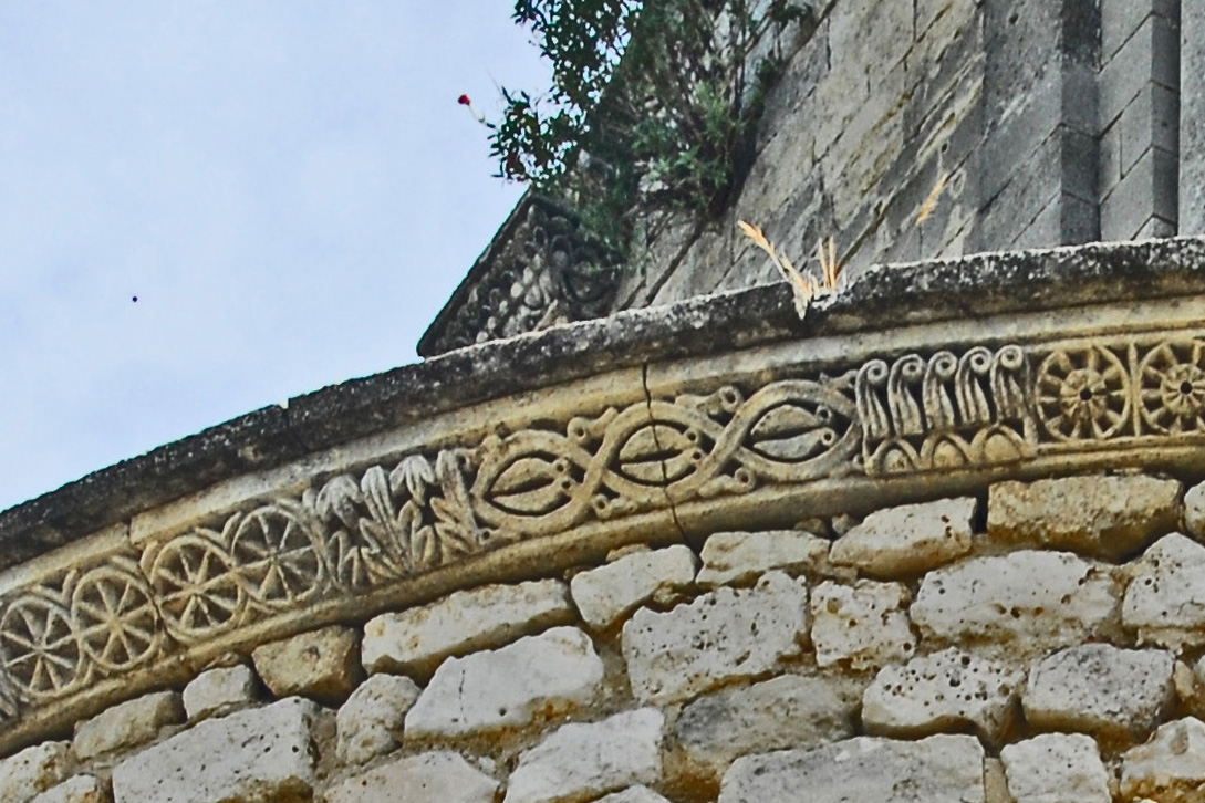 St-Michel de La Garde- Adhémar. Traufgesims Westapsis